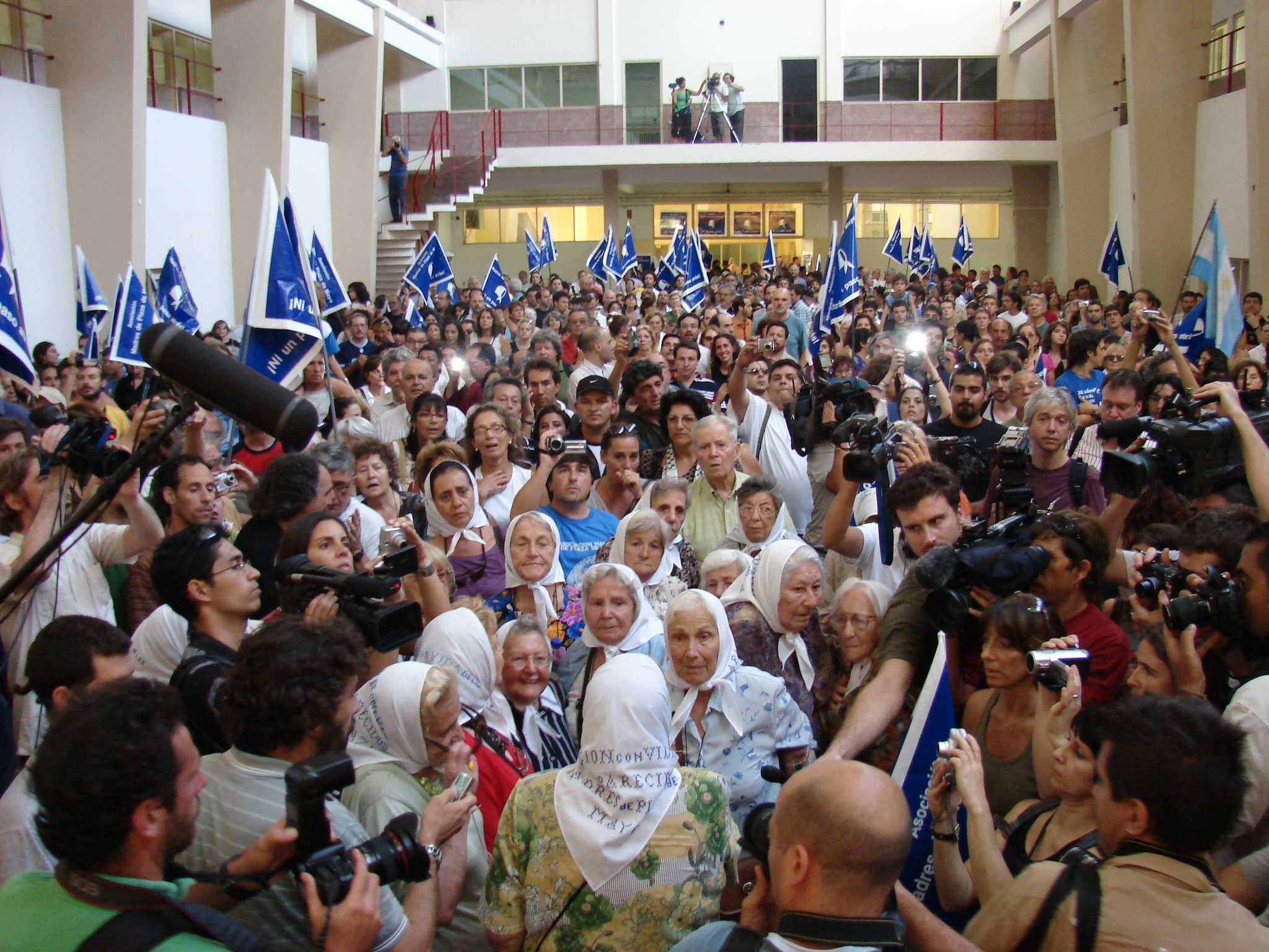 Las Madres al momento del desembarco, con una multitud que las acompañó, en la sala grande del ECuNHi